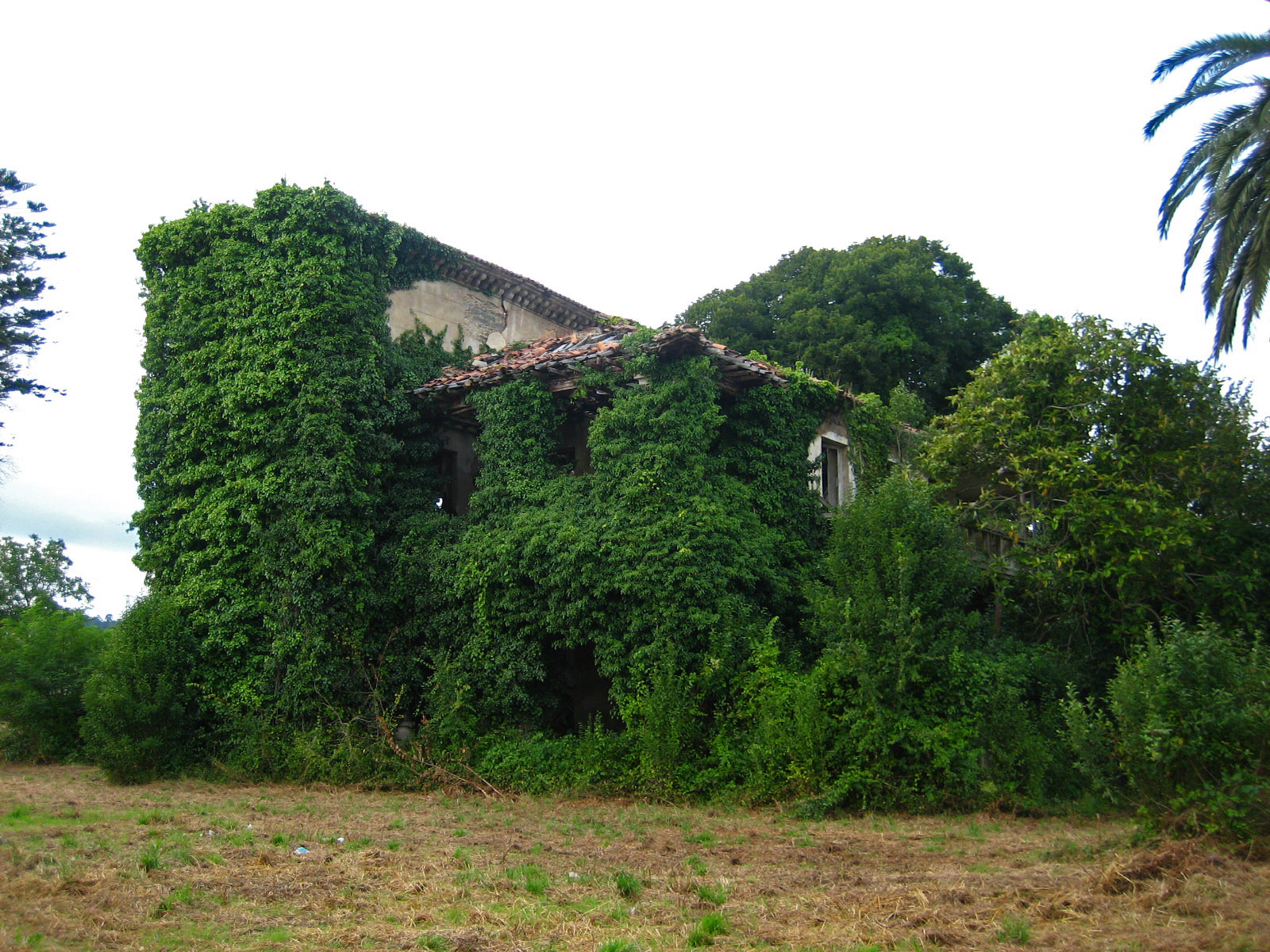 Casa abandonada en Guísamo, Bergondo. Posición